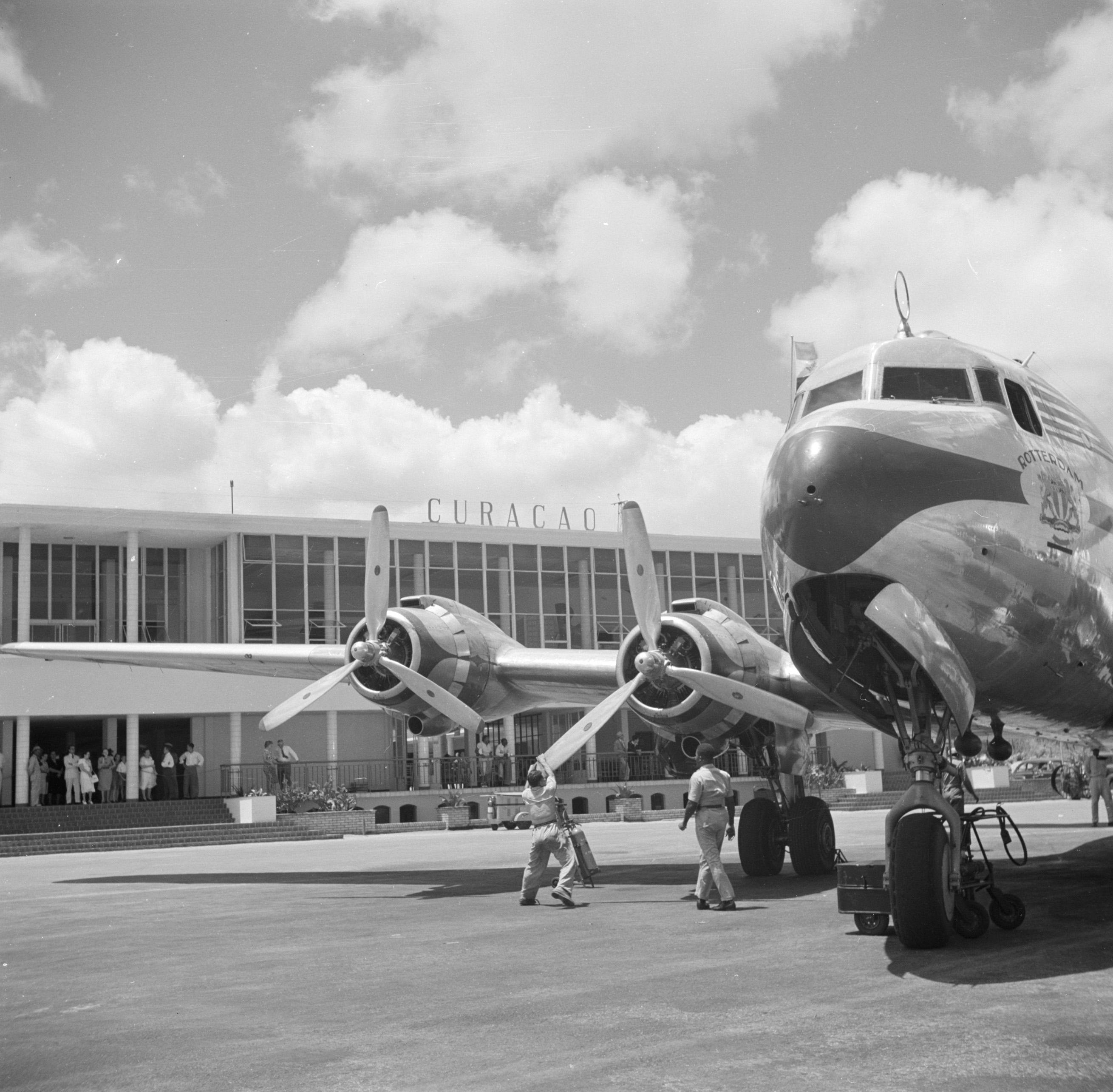 Collectie / Archief : Fotocollectie Van de Poll Reportage / Serie : Reis naar Suriname en de Nederlandse Antillen Beschrijving : Het gebouw van vliegveld Hato op Curaçao Datum : 1947 Locatie : Curaçao Trefwoorden : gebouwen, vliegtuigen, vliegvelden Fotograaf : Poll, Willem van de, [onbekend] Auteursrechthebbende : Nationaal Archief Materiaalsoort : Negatief (zwart/wit) Nummer archiefinventaris : bekijk toegang 2.24.14.02 Bestanddeelnummer : 252-7689